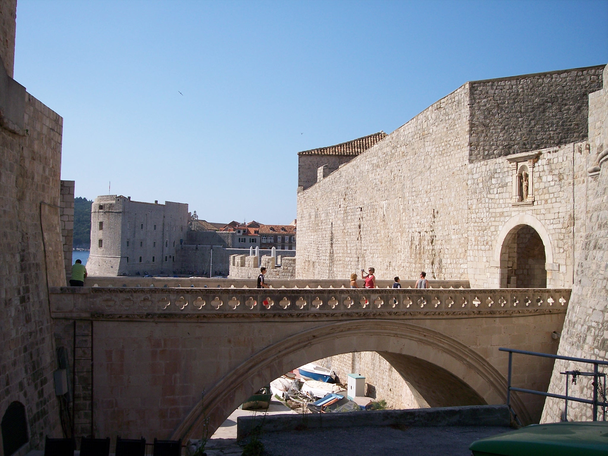 Dubrovnik (Croatia)